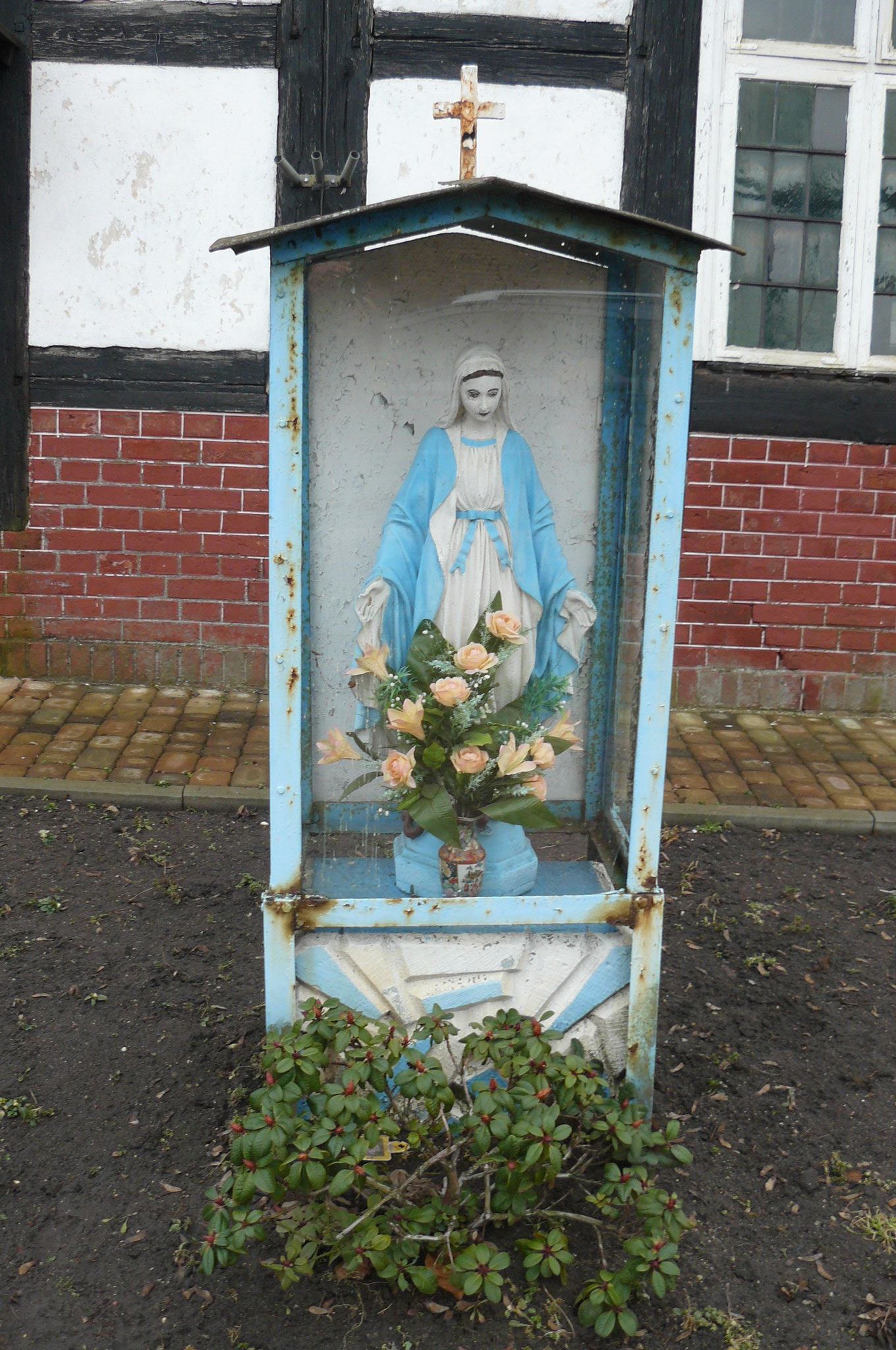 Chełst - rzymskokatolicki kościół filialny pw. Matki Boskiej Królowej Polski